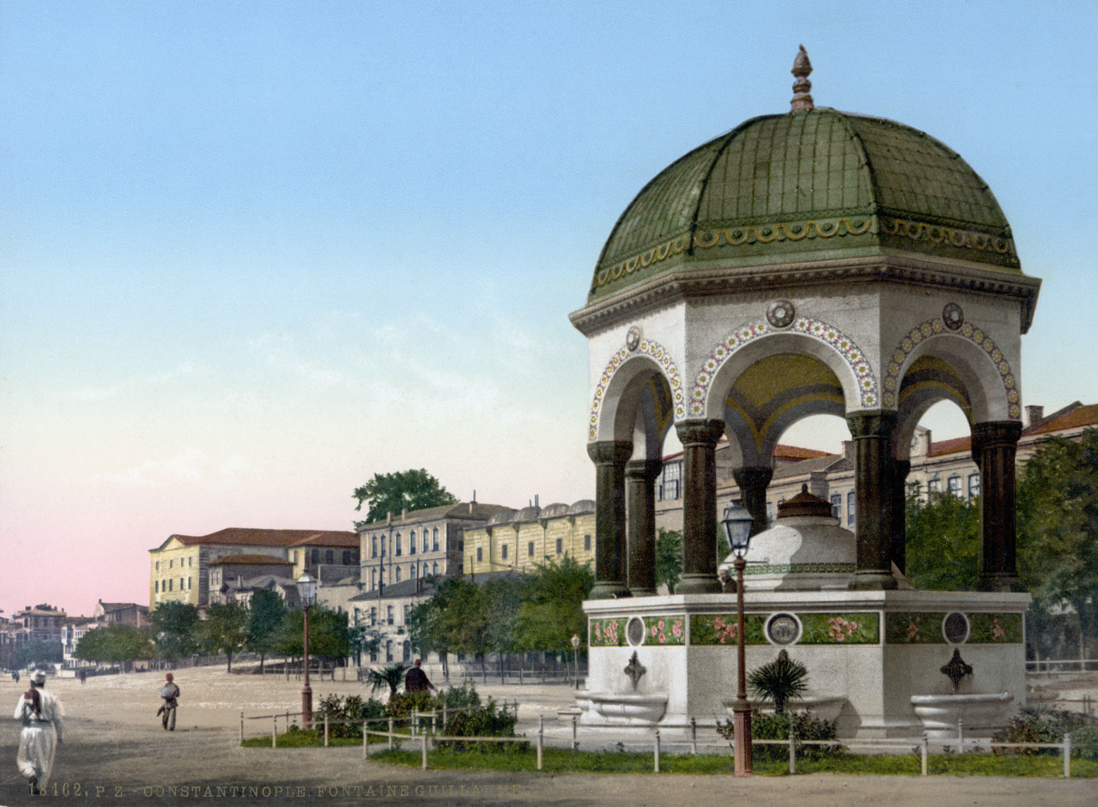 Alman Çeşmesi, Sultanahmet, Istanbul, Turkey.